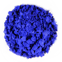 Tetramminkupfer(II)-sulfat-Monohydrat-Kristalle.